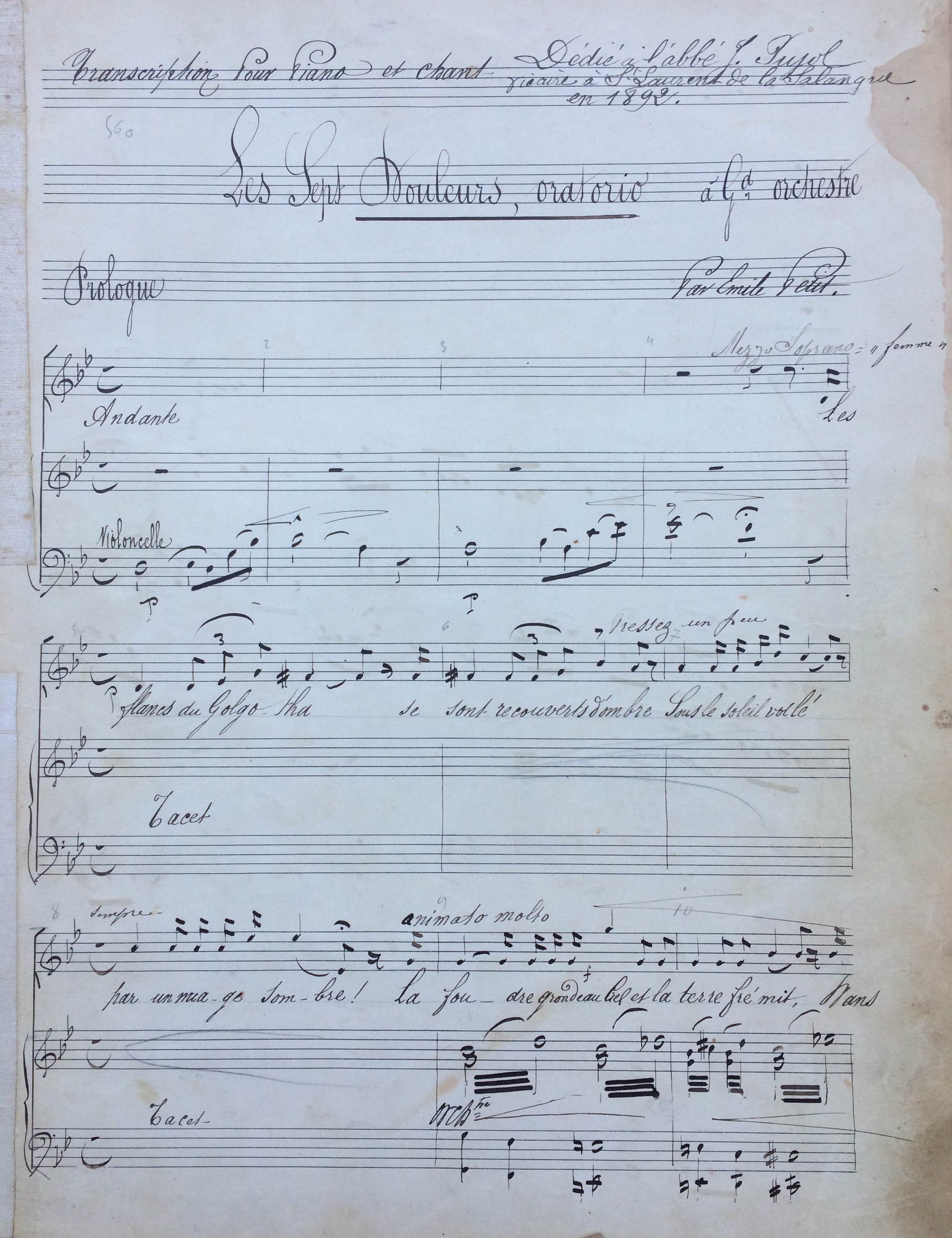 Réduction pour soliste, chœur et piano de l'Oratorio Les Sept douleurs de la Vierge par Émile Petit.